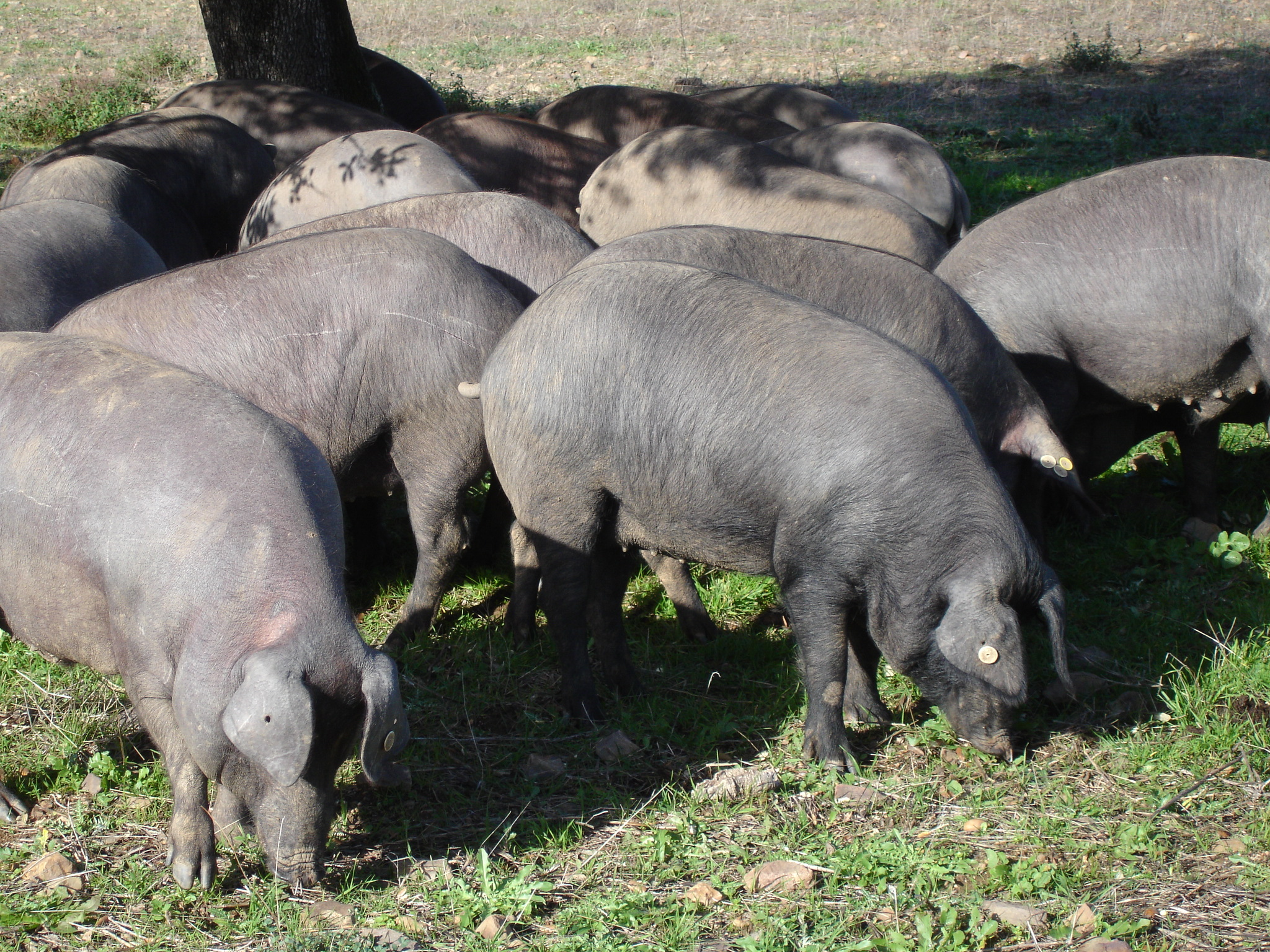 Carlos urbina ibéricos en Extremadura (España).